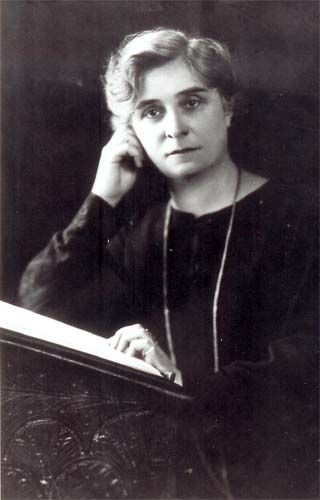 Maria Vérone, avocate dans les années 1920